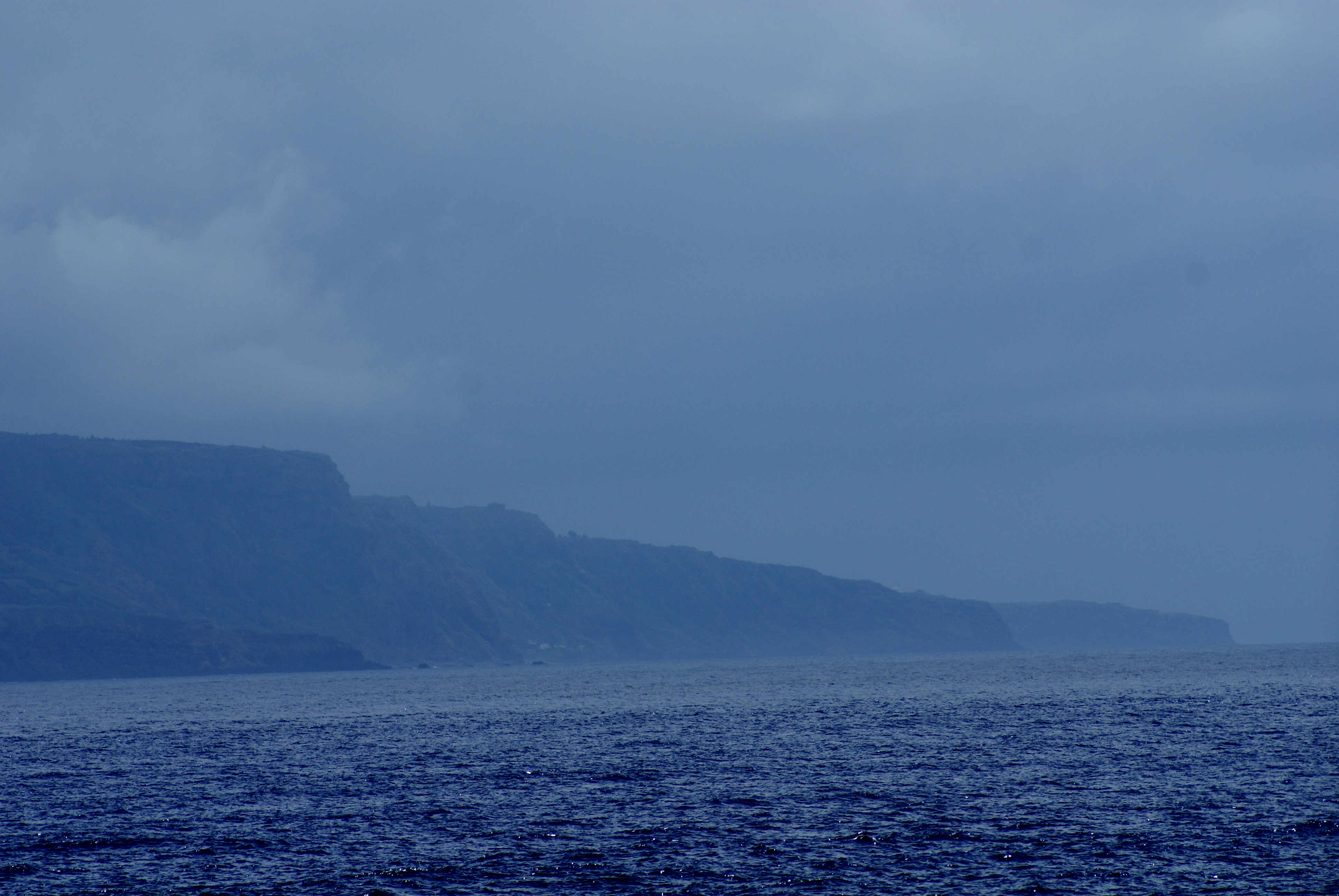 Ponta da Candelaria, Ponta Delgada, ilha de São Miguel, Açores